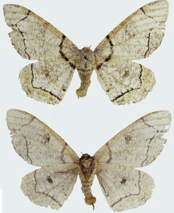 Biston mediolata